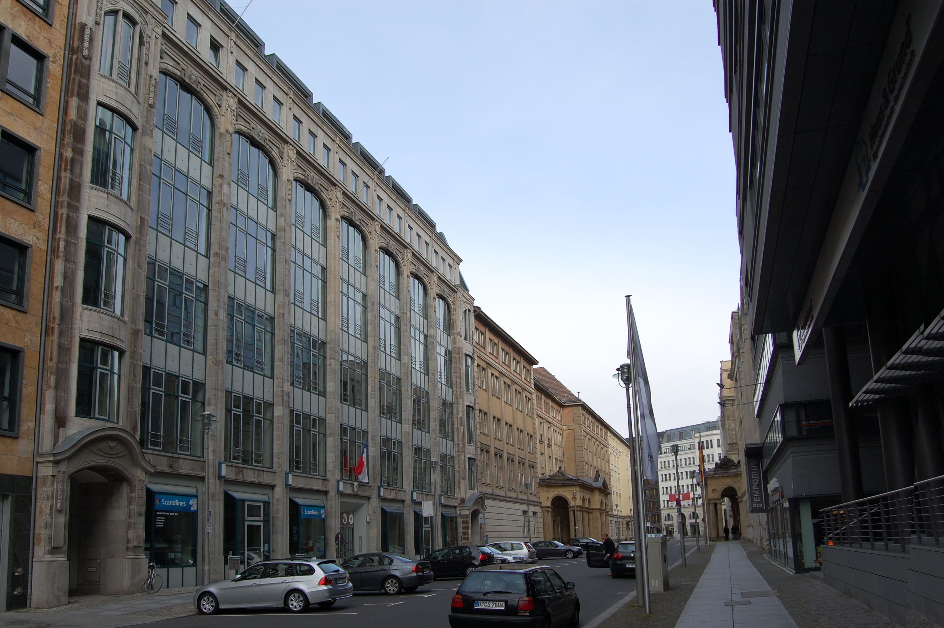 Embassies of Chile, Peru and Liechtenstein in Berlin